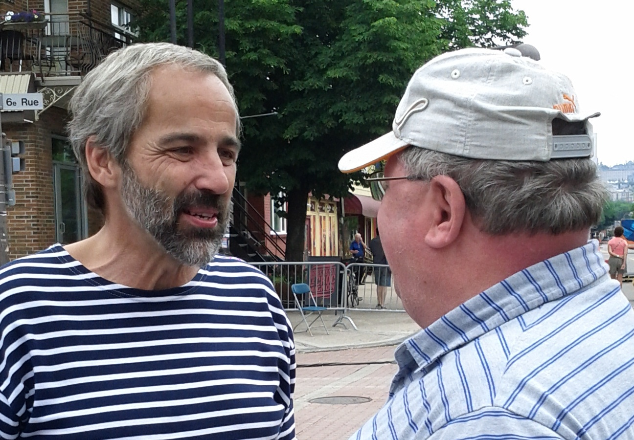 Daniel Paillé discute avec un citoyen lors d'un événement dans le quartier Limoiou de Québec, le 23 juin 2013.